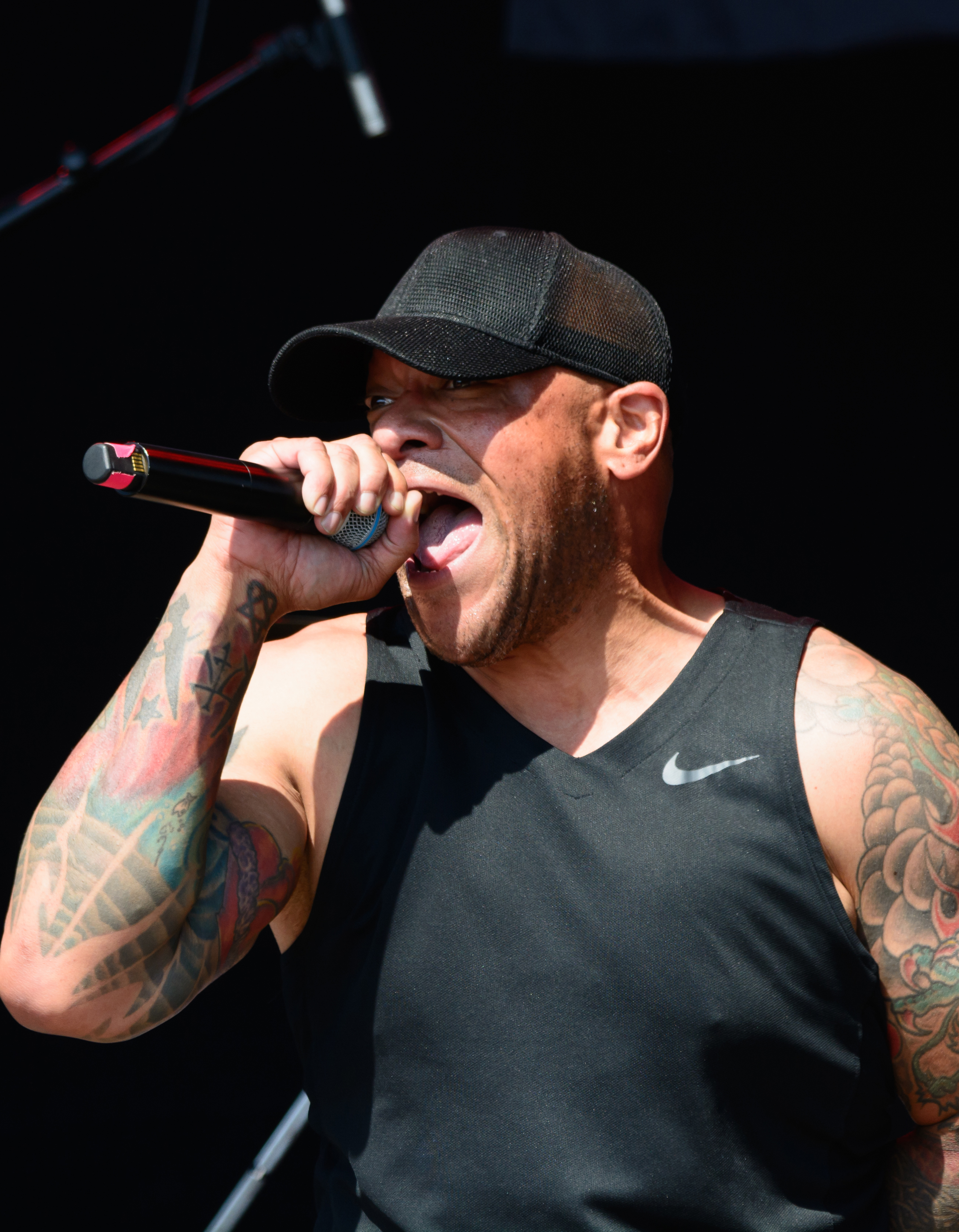 Howard Jones beim Elbriot 2018